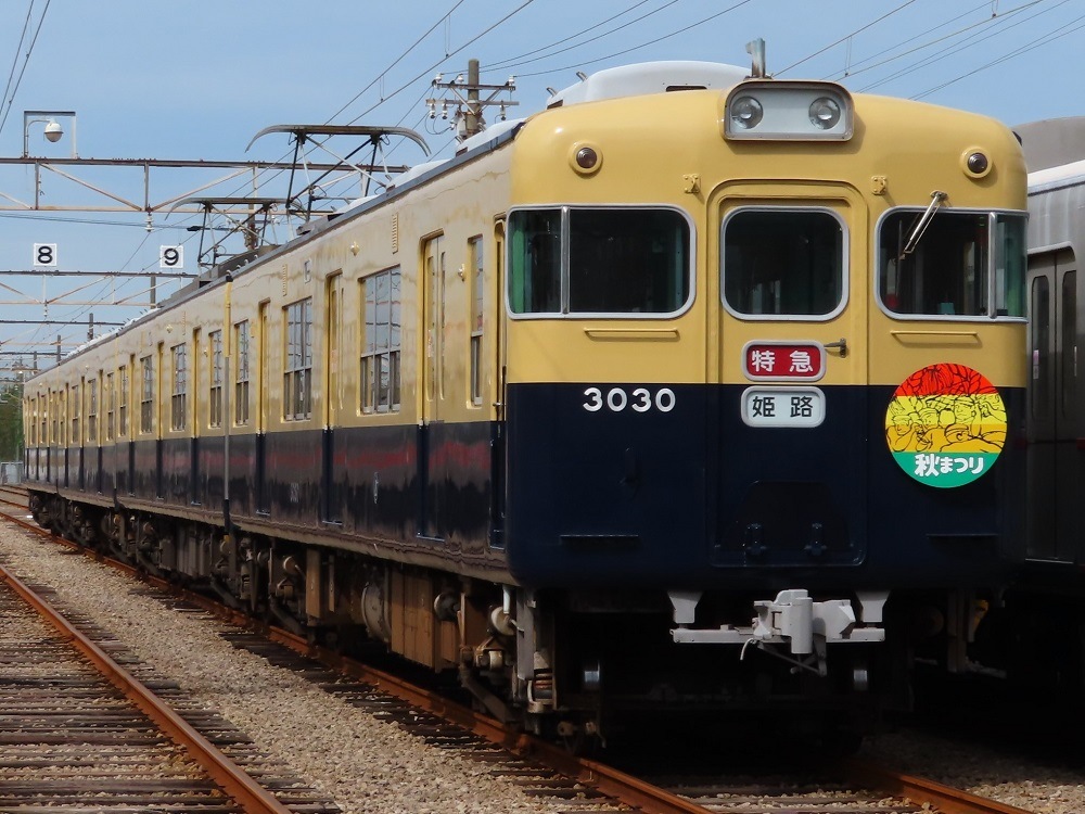 山陽鉄道フェスティバル2019